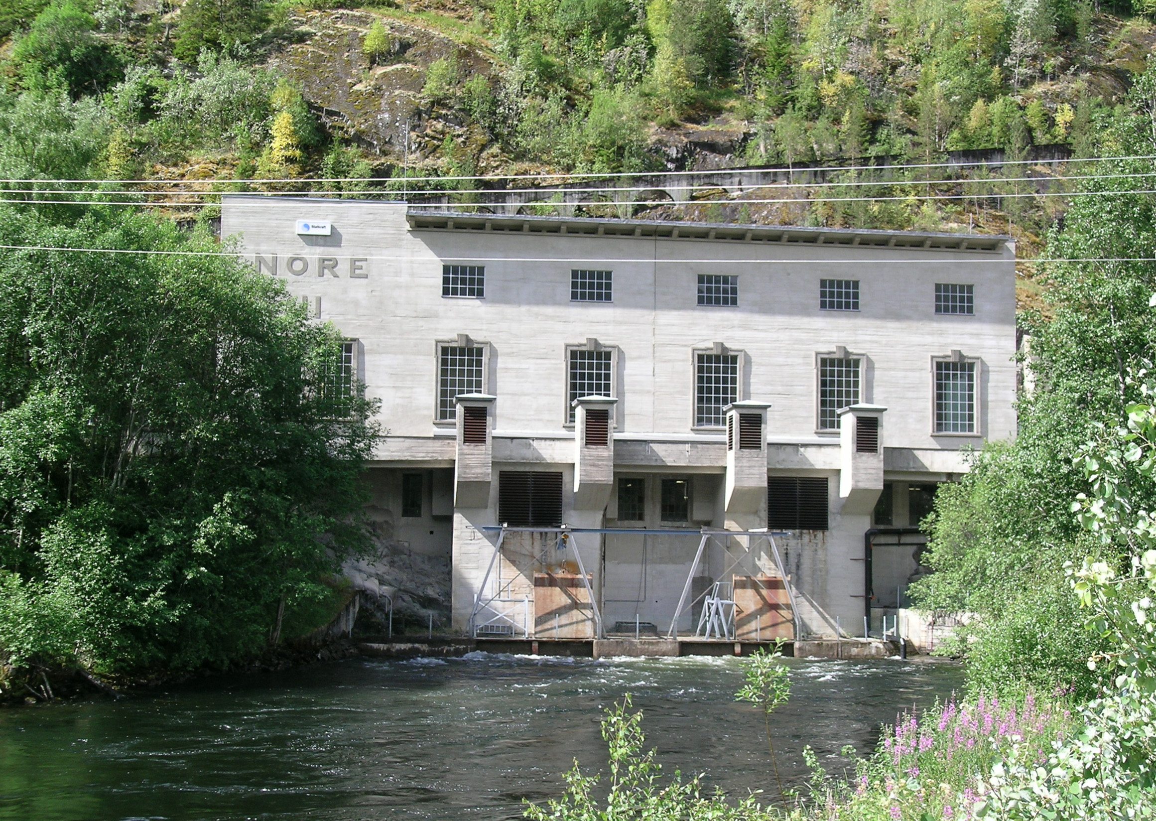 Nore II. Nore og Uvdal, Buskerud, Norway.